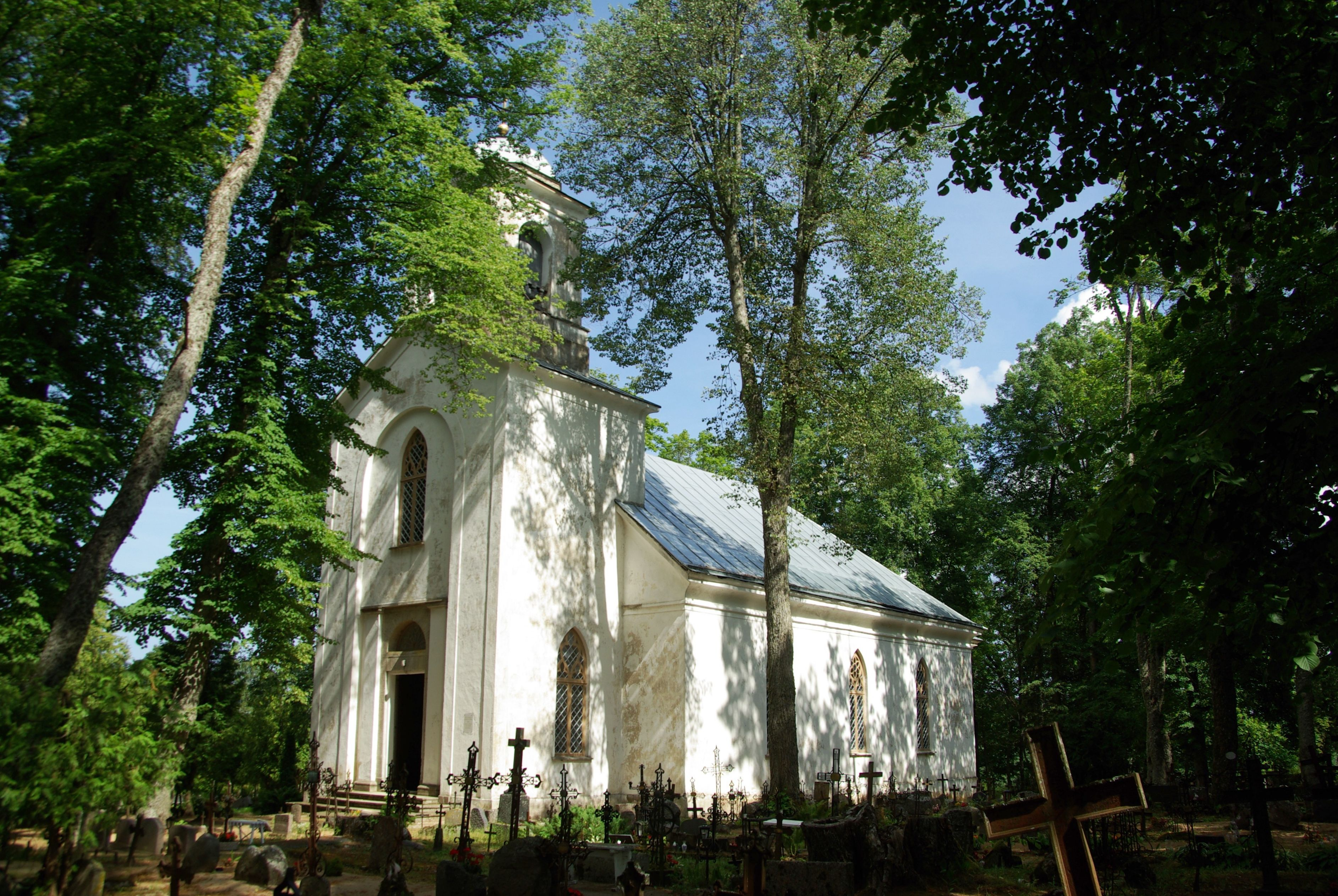 Ilumäe kabel